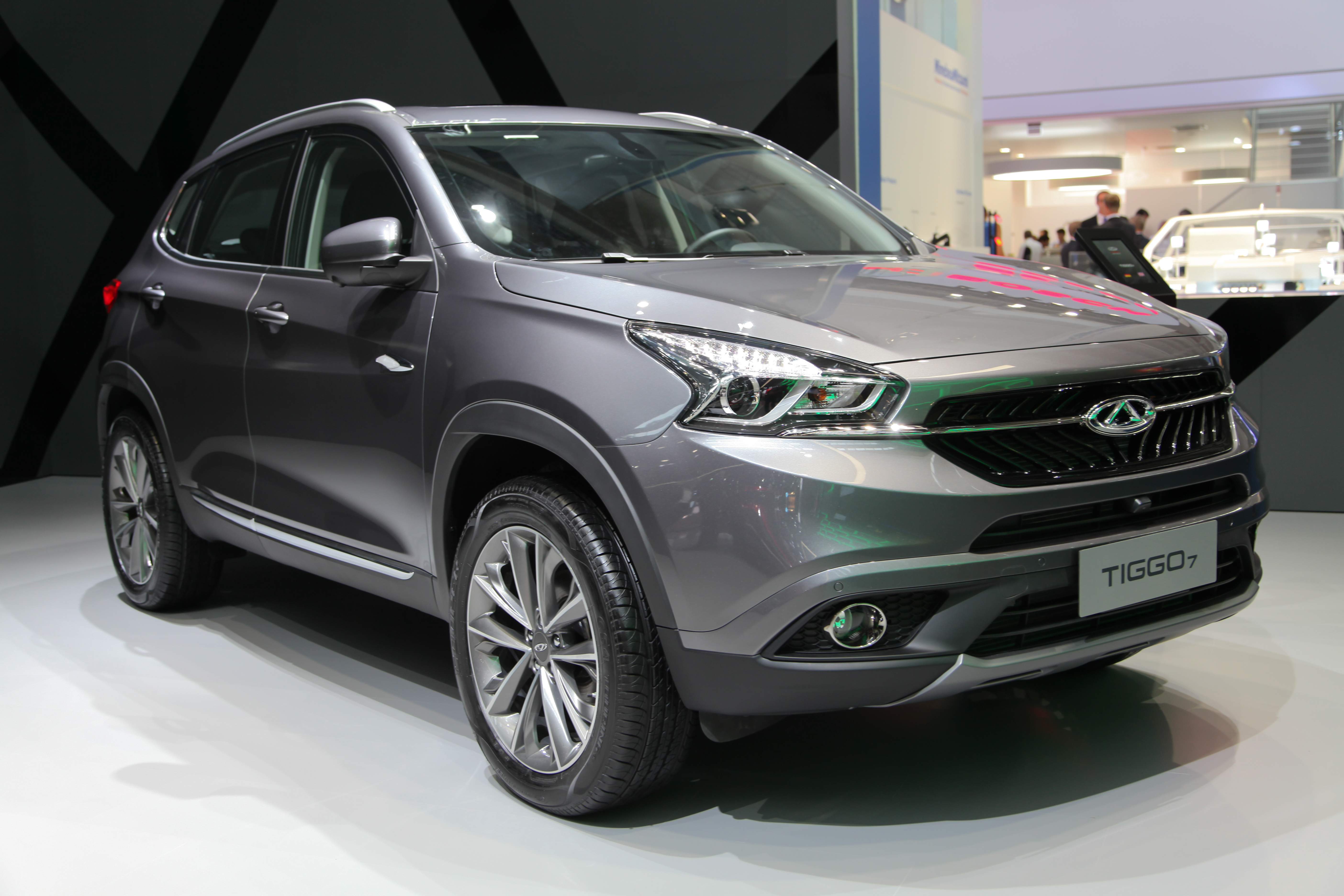 Chery Tiggo 7 auf der IAA 2017